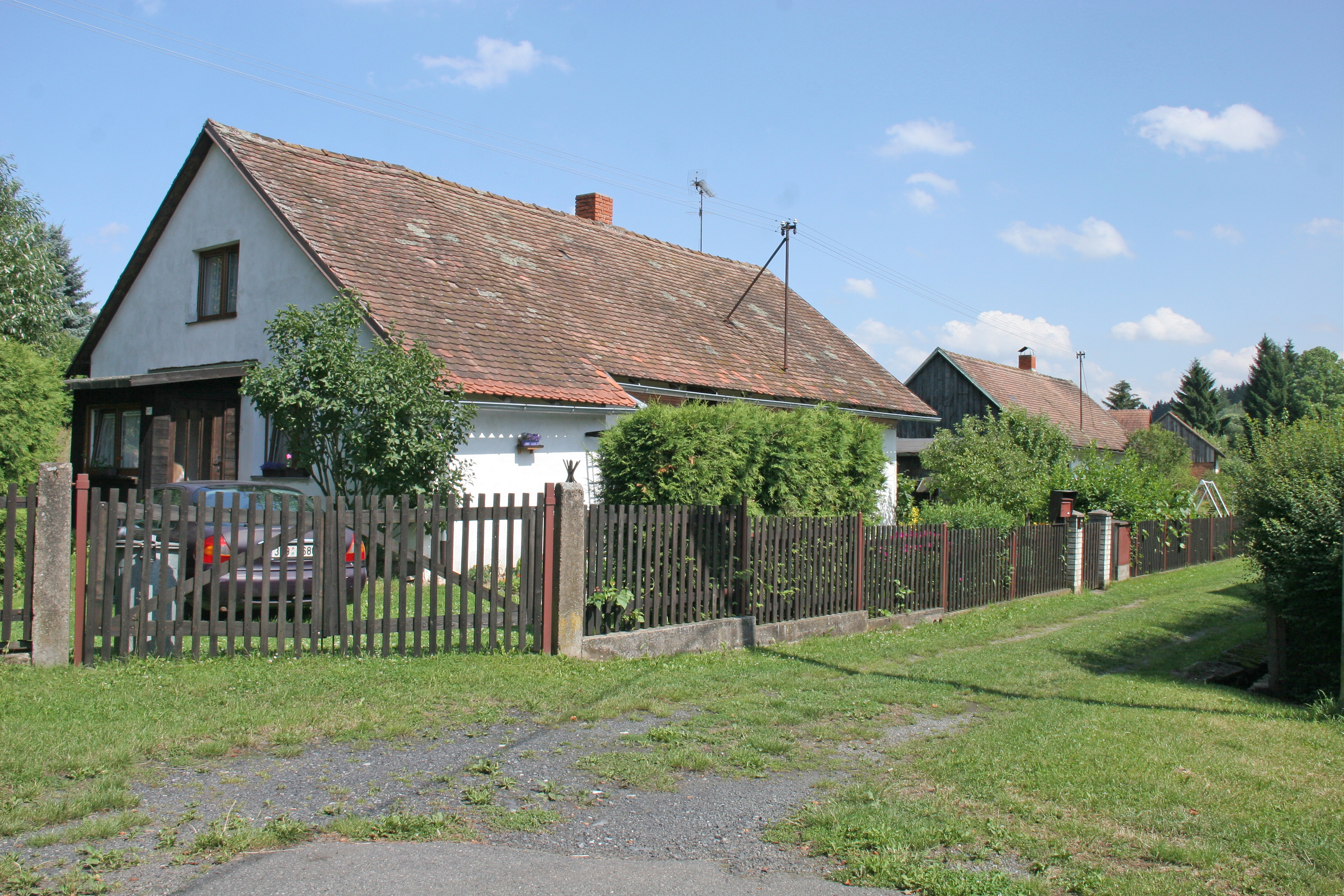 Kraskov čp. 47